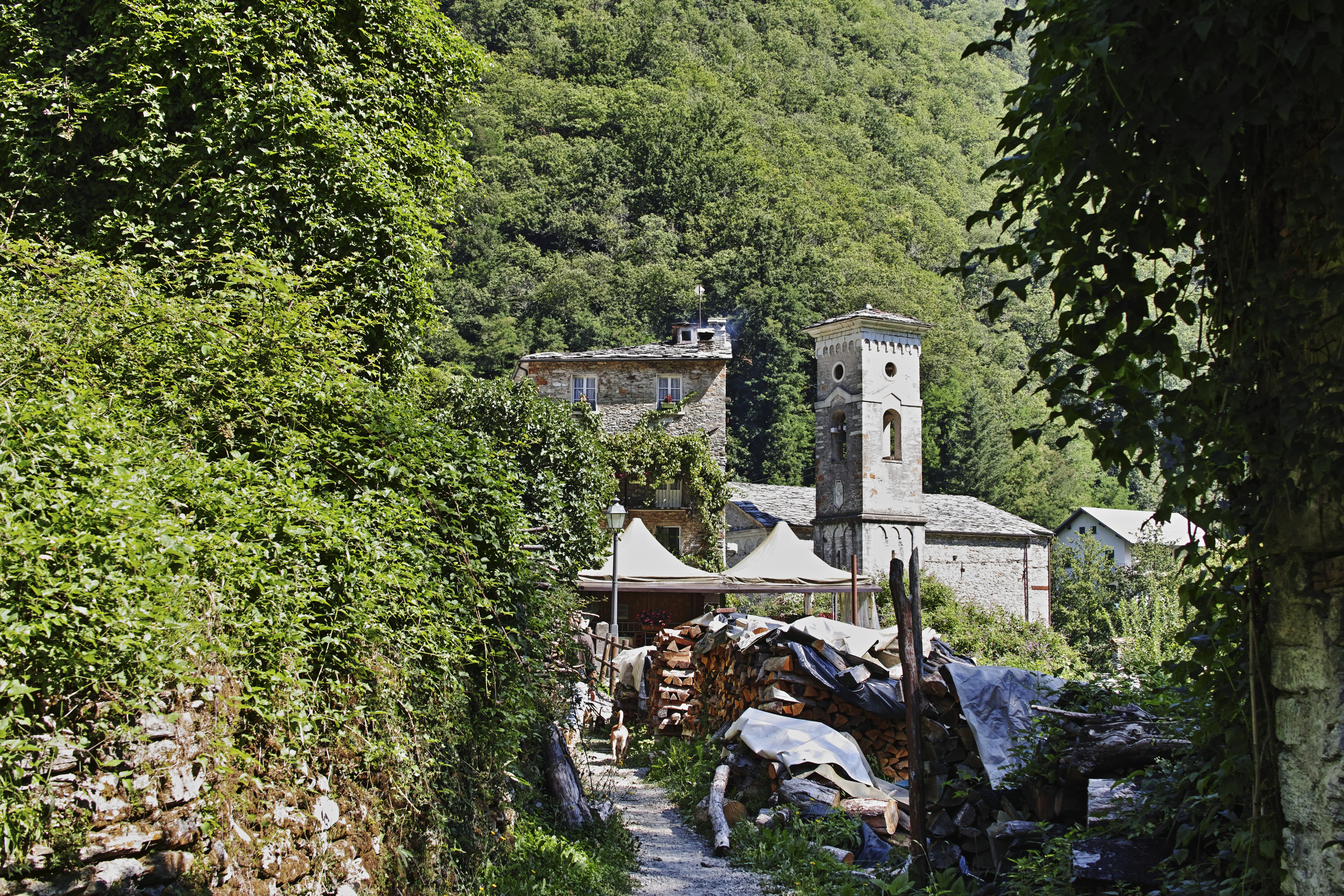 Isola Santa, scorcio della Chiesa dal Sentiero